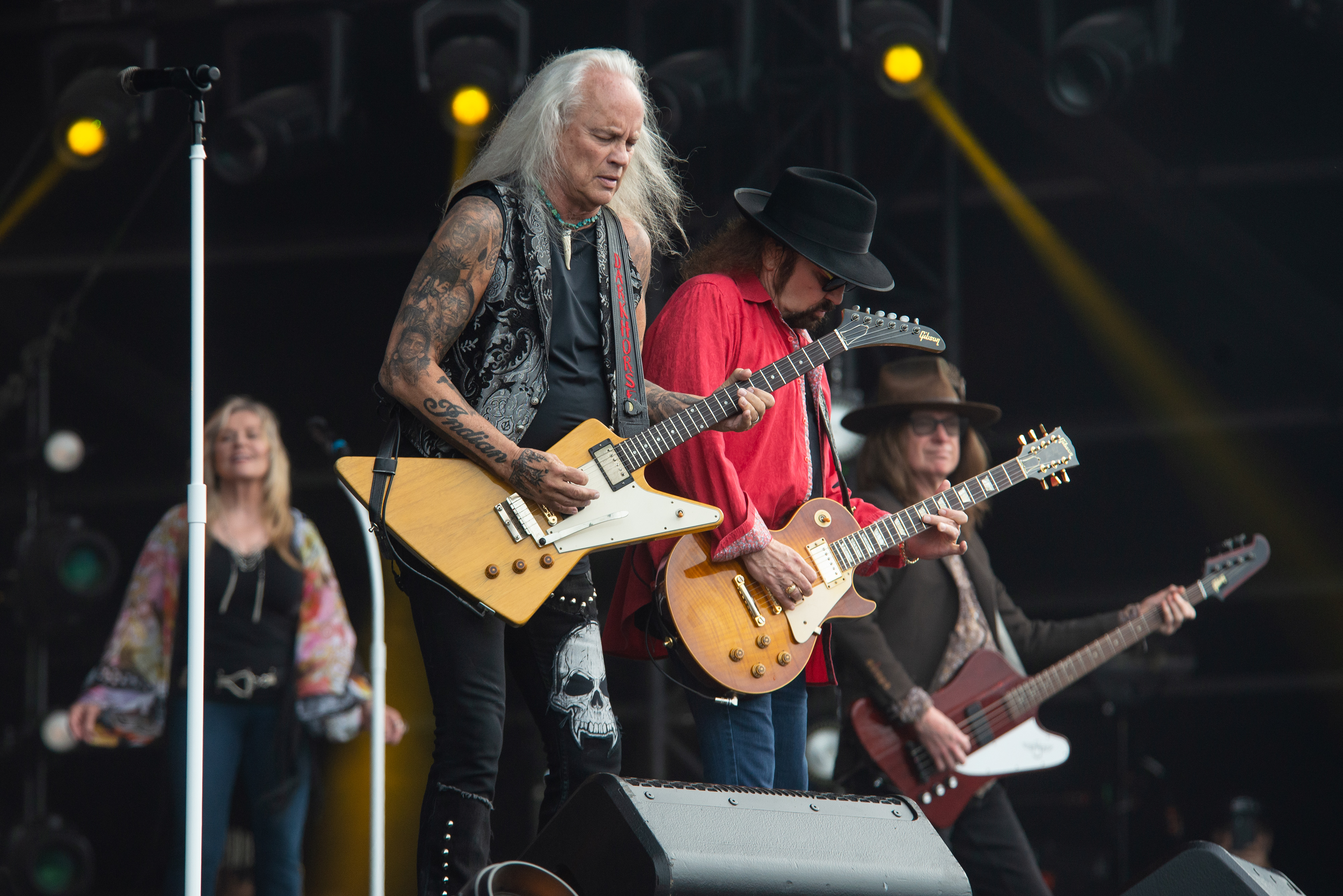 Concert du groupe américain Lynyrd Skynyrd au Hellfest 2019.